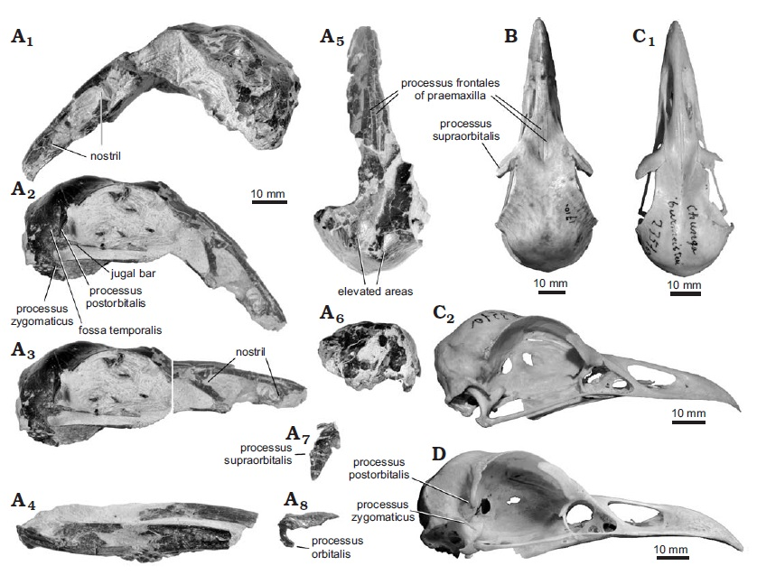 Comparison of skulls and mandibles of the seriema (Cariamidae) Noriegavis santacrucensis (Noriega Vizcaíno, and Bargo, 2009) from the early Miocene Santa Cruz Formation in Argentina (A) with extant Chunga burmeisteri (Hartlaub, 1860) (C) and extant Cariama cristata Bonaparte, 1853 (B, D).